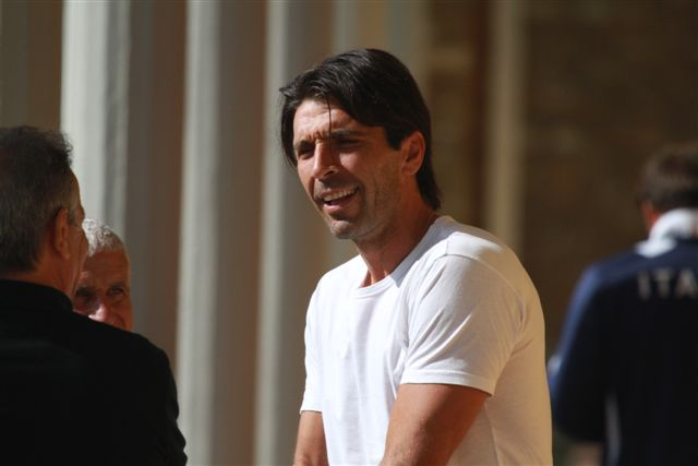 Il portiere italiano Buffon.